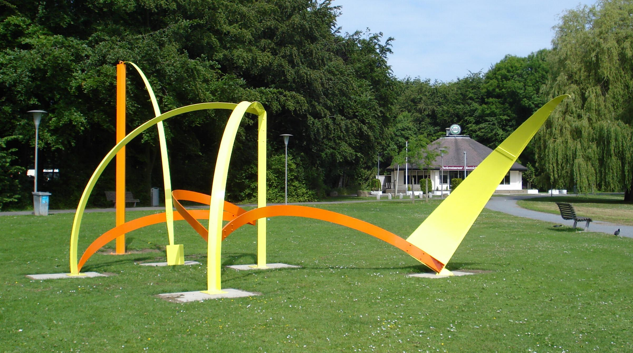 Rotterdam, Zuiderpark, ter hoogte Oldengaarde / Meyenhage (tot 2008 in Parklaan bij Veerhaven). Sculpture Quill (1971) by Phillip King. Rotterdam/The Netherlands